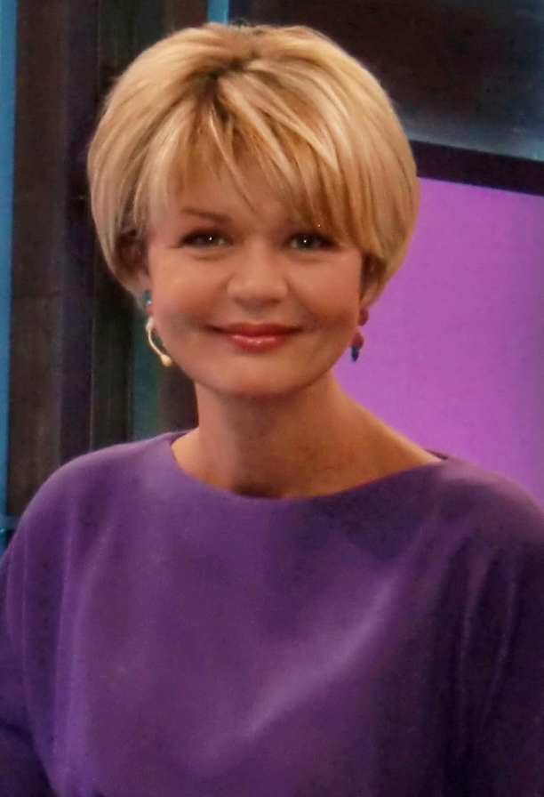 Фотография сделана в студии после завершения съемок передачи "Наедине со всеми"- Взгляд в будущее.